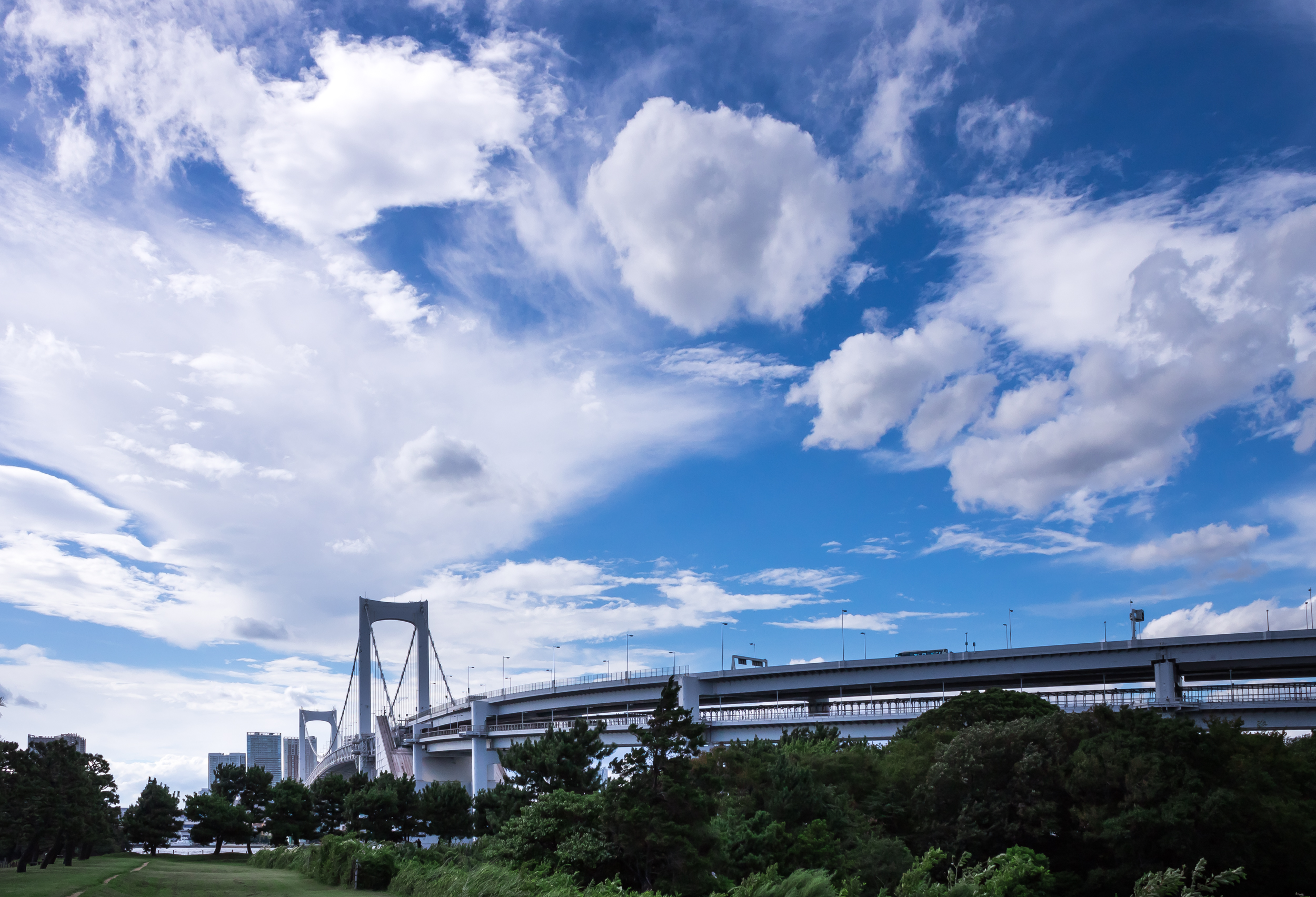 レインボーブリッジと空